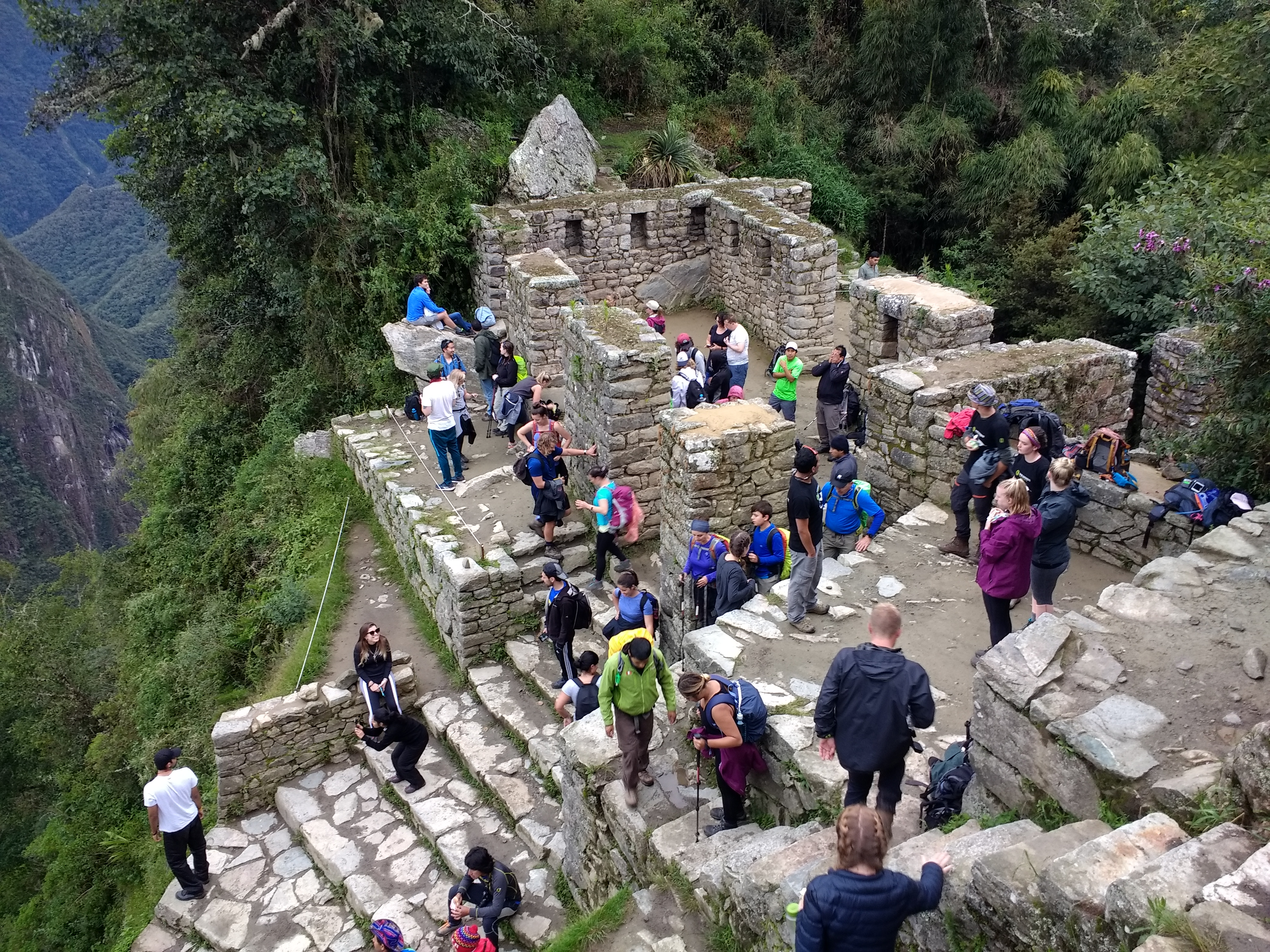 Inti Punku (Sun Gate) at Machu Picchu.